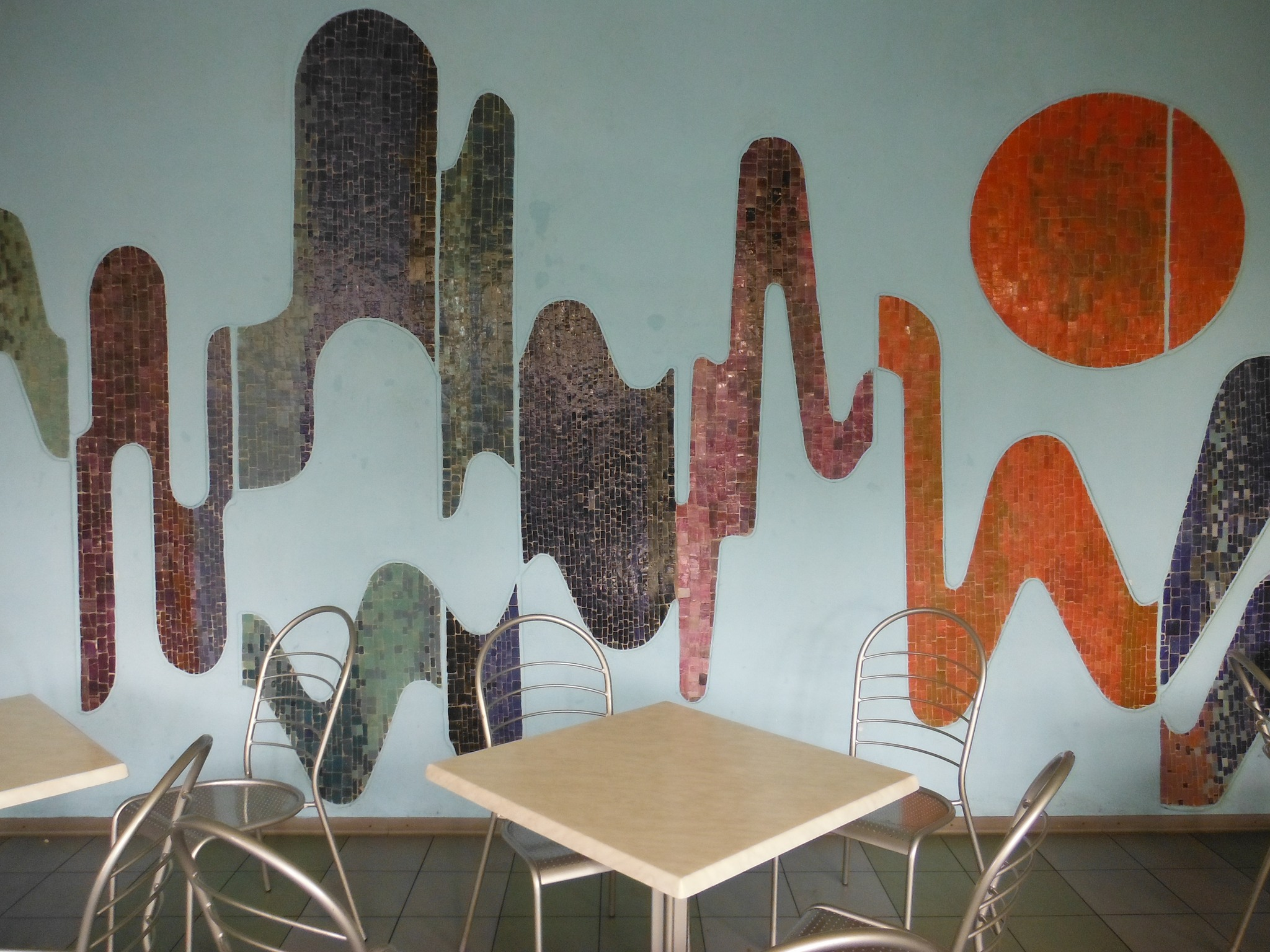 Mozaika w Barze Alpejskim przy ul. Międzynarodowej w Warszawie.